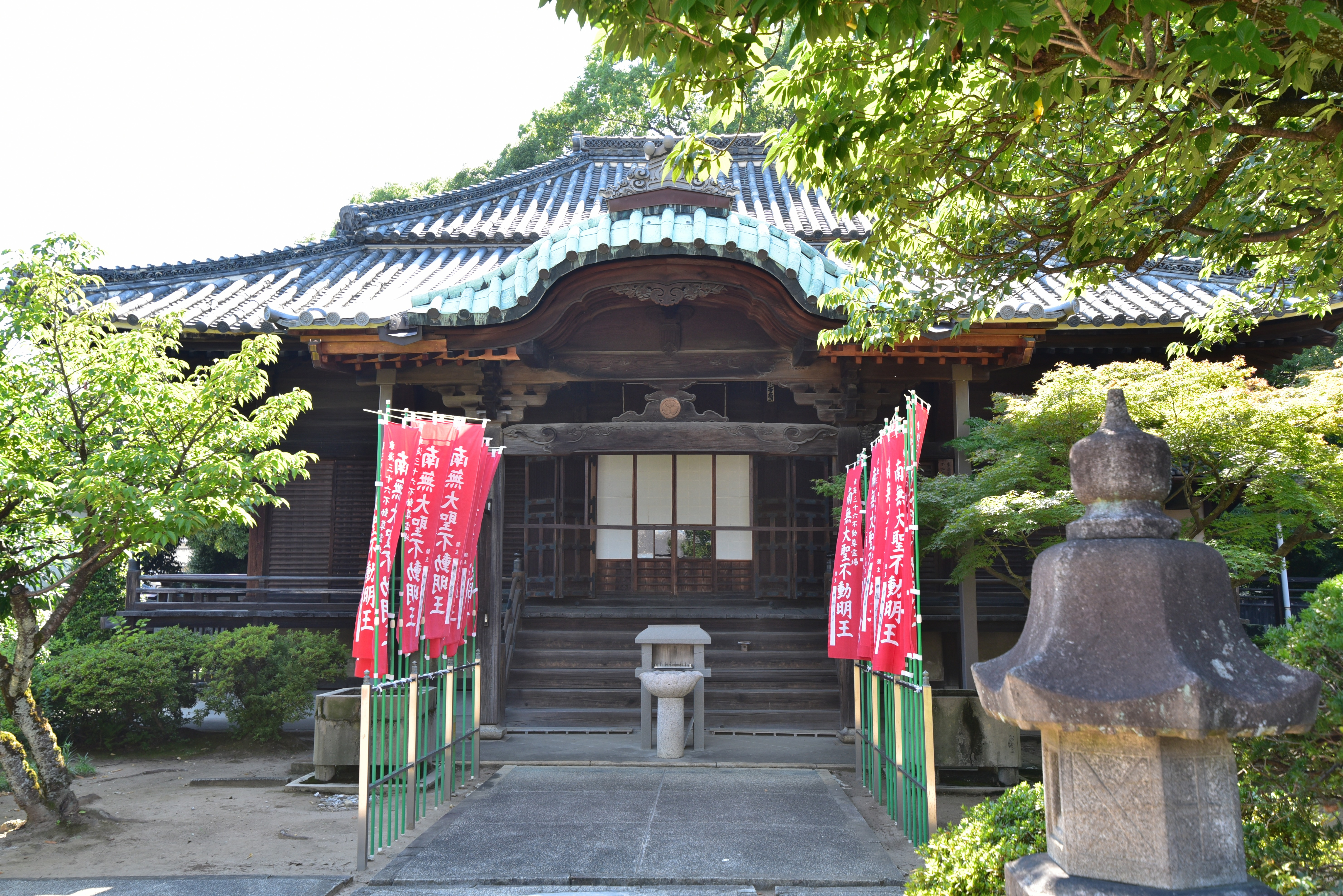 長久寺（文化のみち）